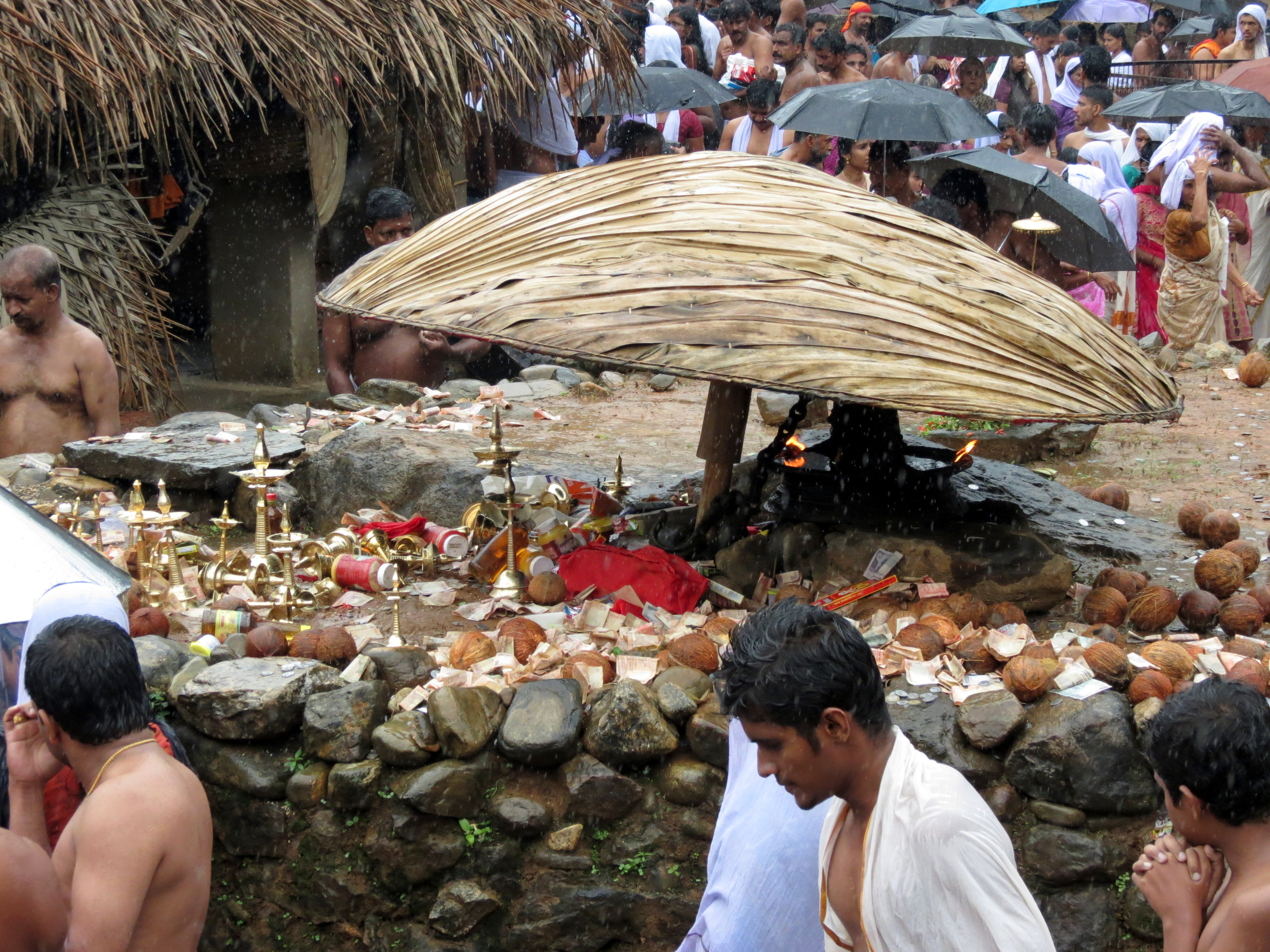 Vaisakha festival June 2013 at Kottiyoor temple, Kerala, India